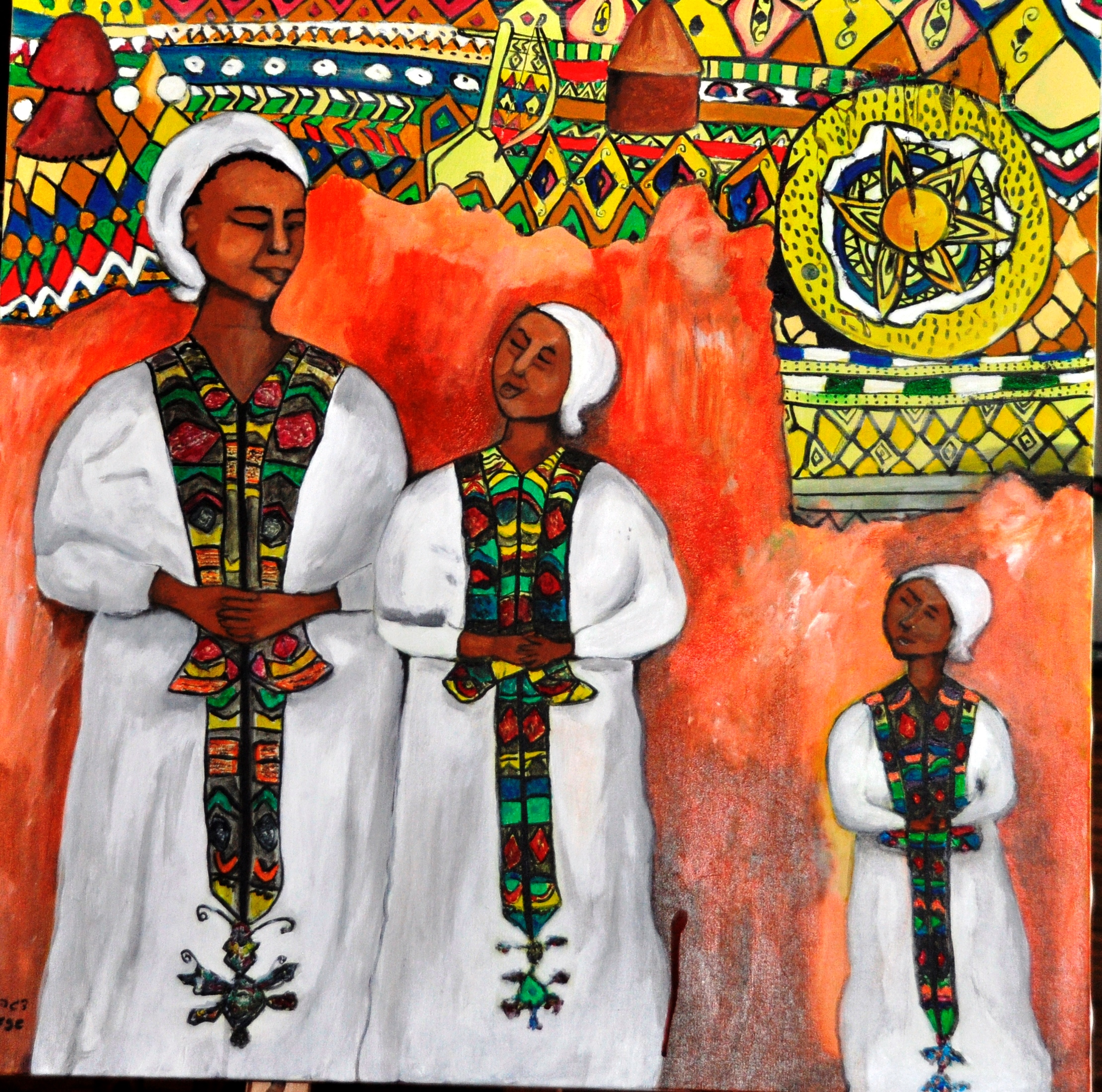 הנשגב - דגה פדר, אקריליק על בד